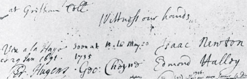 Signature